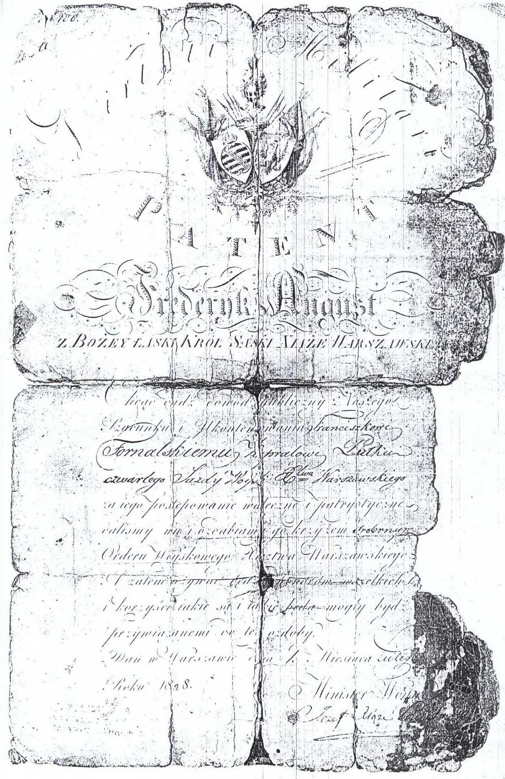 Oryginalny patent na order Virtuti Militari dla Franciszka Fornalskiego z 1808 roku podpisany osobiście przez księcia Józefa Poniatowskiego. Patent ten pochodzi z pamiątek rodzinnych, grafika jest wykonanym przeze mnie skanem. Treść patentu: VIRTUTI MILITARI PATENT Frederyk August z Bożey Łaski Król Saski Xiążę Warszawski Chcąc dadź dowód publiczny Naszego Szacunku i Ukontentowania Franciszkowi Fornalskiemu Kapralowi Pułku czwartego Jazdy Woysk Xięztwa Warszawskiego za iego postępowanie waleczne i patryotyczne daliśmy mu i ozdabiamy go Krzyżem srebrnym Orderu Woyskowego Xięztwa Warszawskiego. A zatem używać będzie honorów wszelkich i korzyści, iakie są, i iakie będą mogły bydź przywiązanemi do tey ozdoby. Dań w Warszawie dnia 1go Miesiąca Lutego Roku 1808. Minister Woyny Józef Xiąże Poniatowski